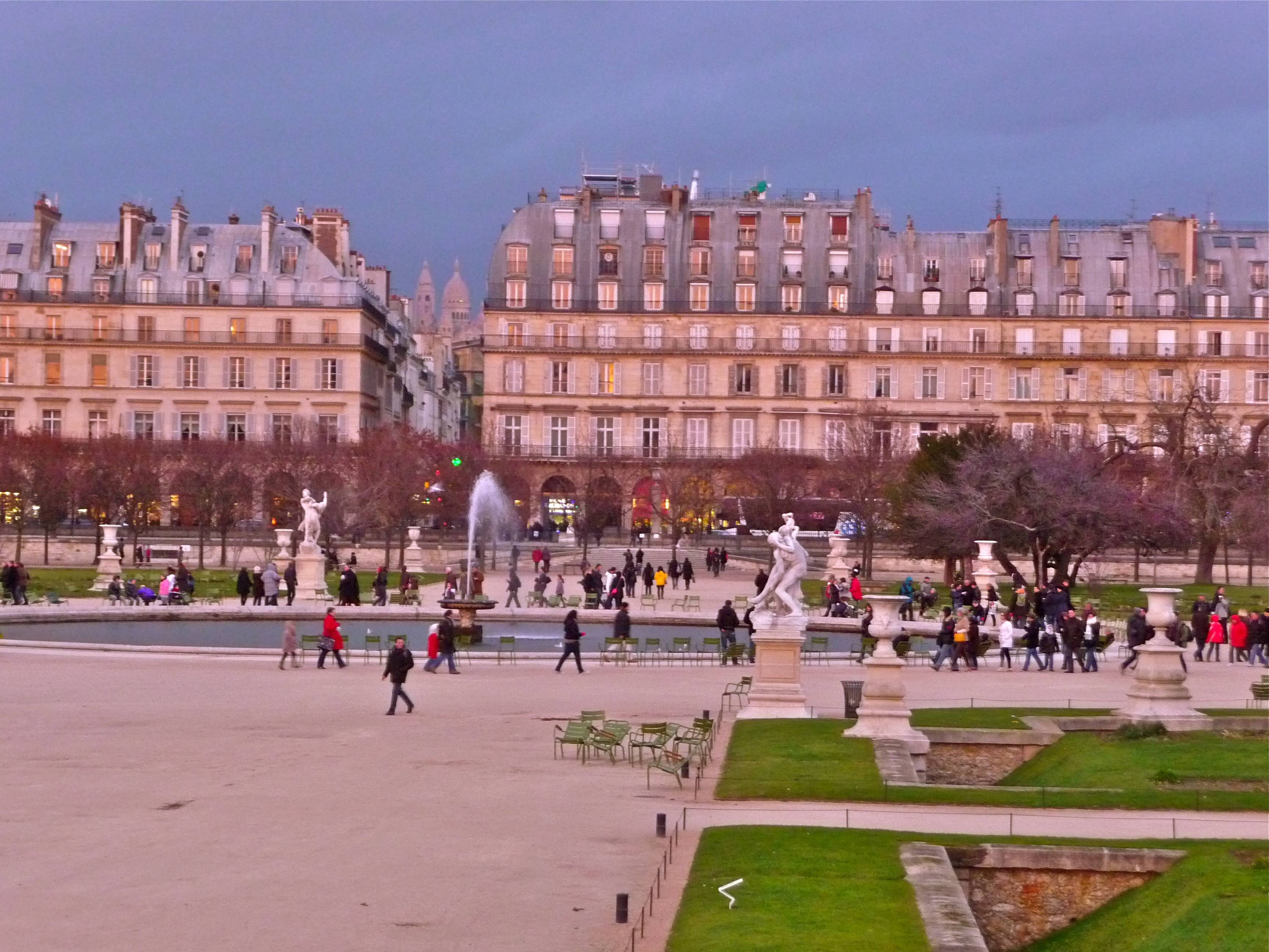 Paris, France